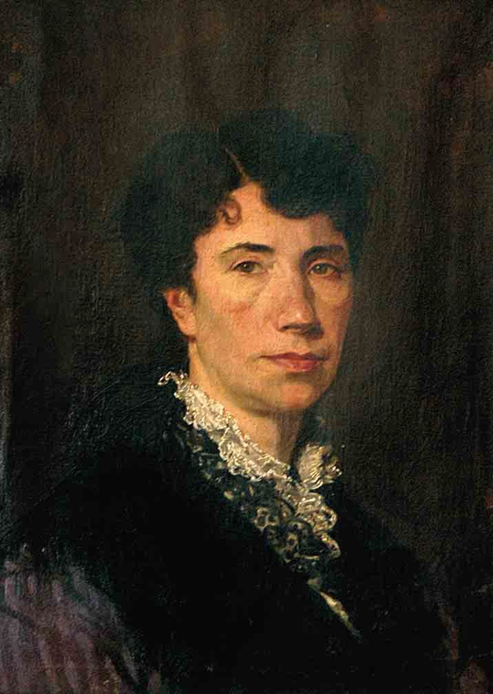 Retrato de la poetisa gallega Rosalia de Castro.